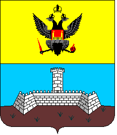 Герб г.Хмельник периода Росийской Империи